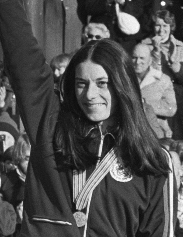 Leah Poulos. Wereldkampioenschap schaatssprint in Alkmaar